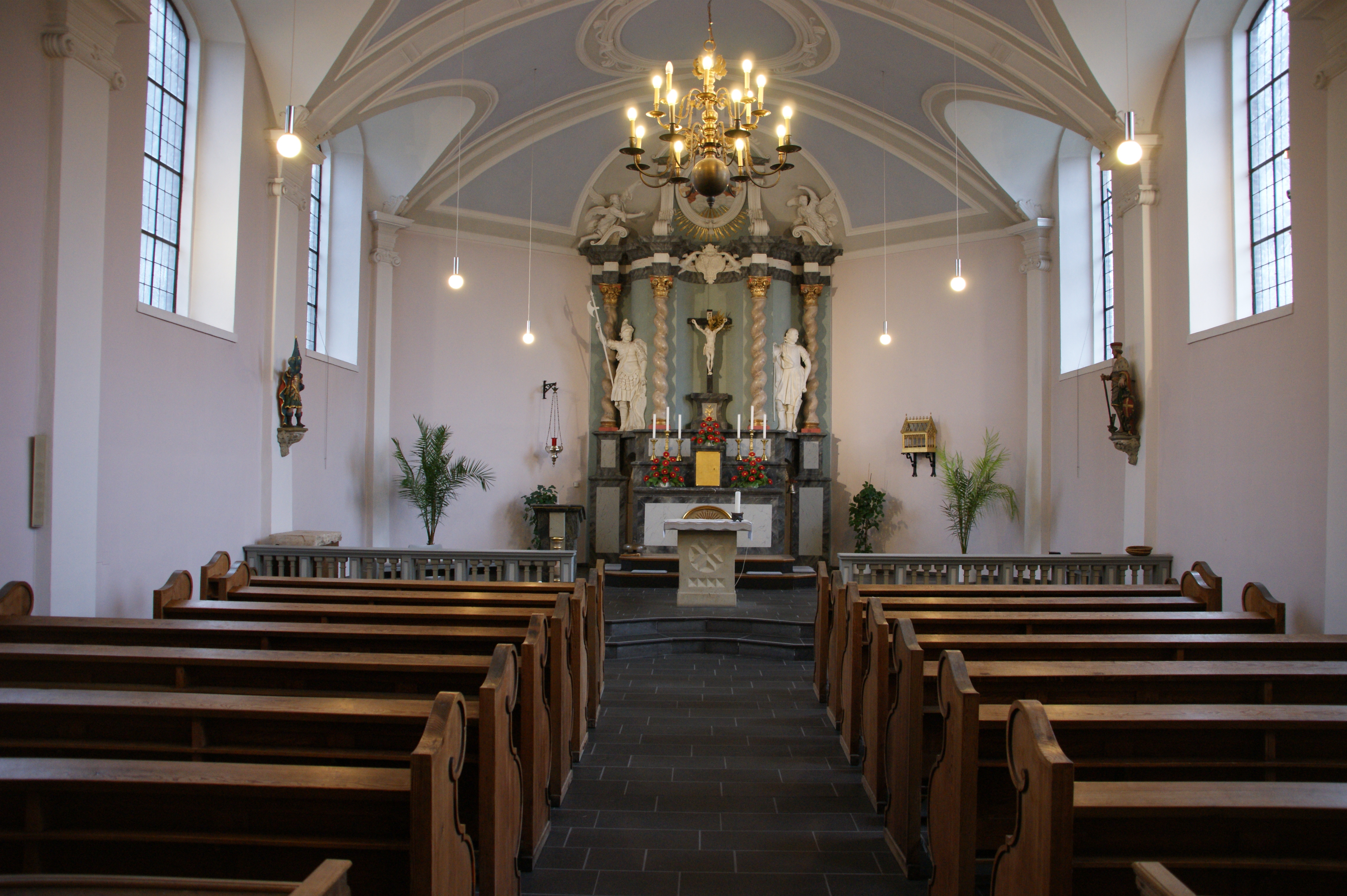 alte katholische Kirche Sankt Mauritius Frechen-Bachem